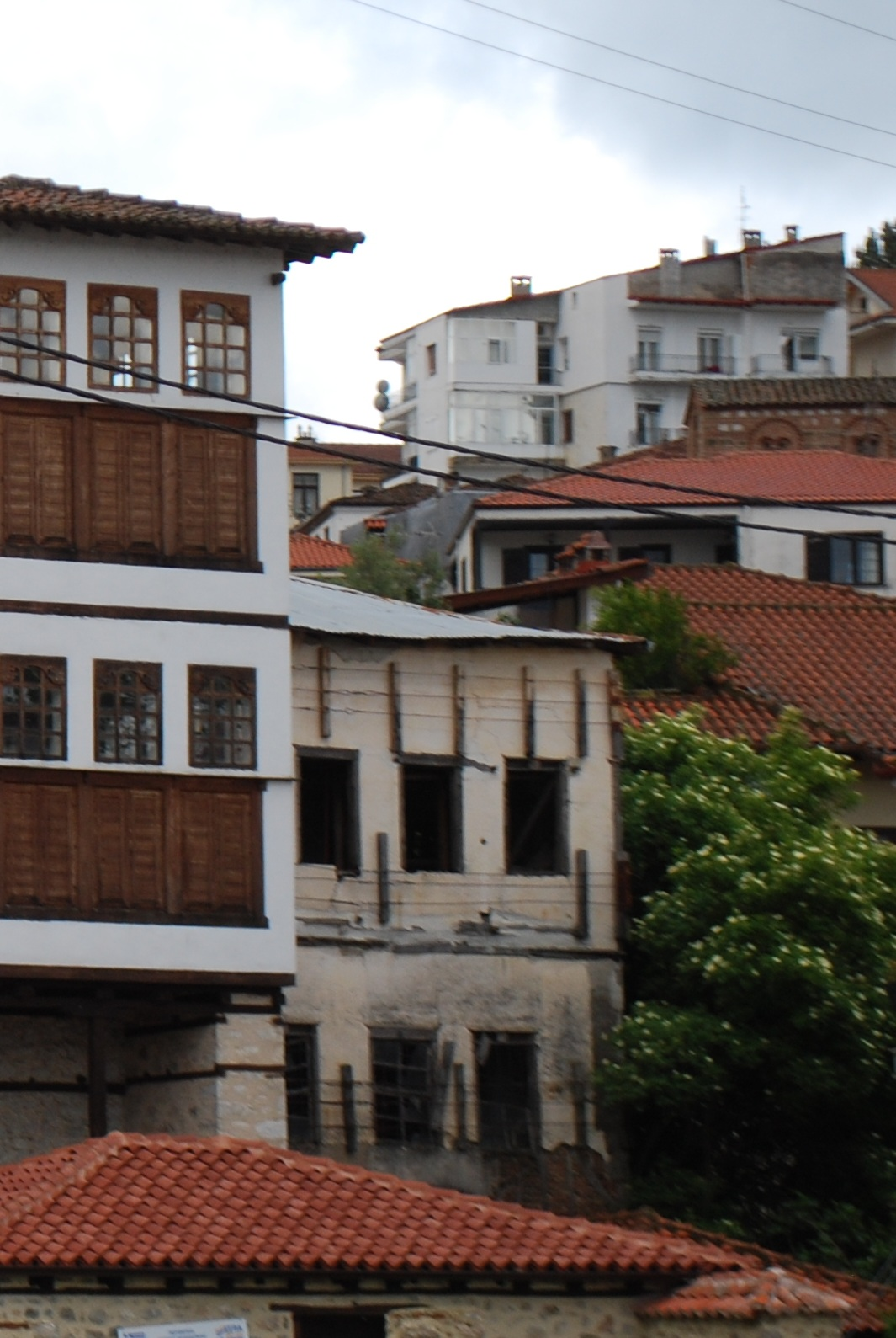 Vue de Kastoria.